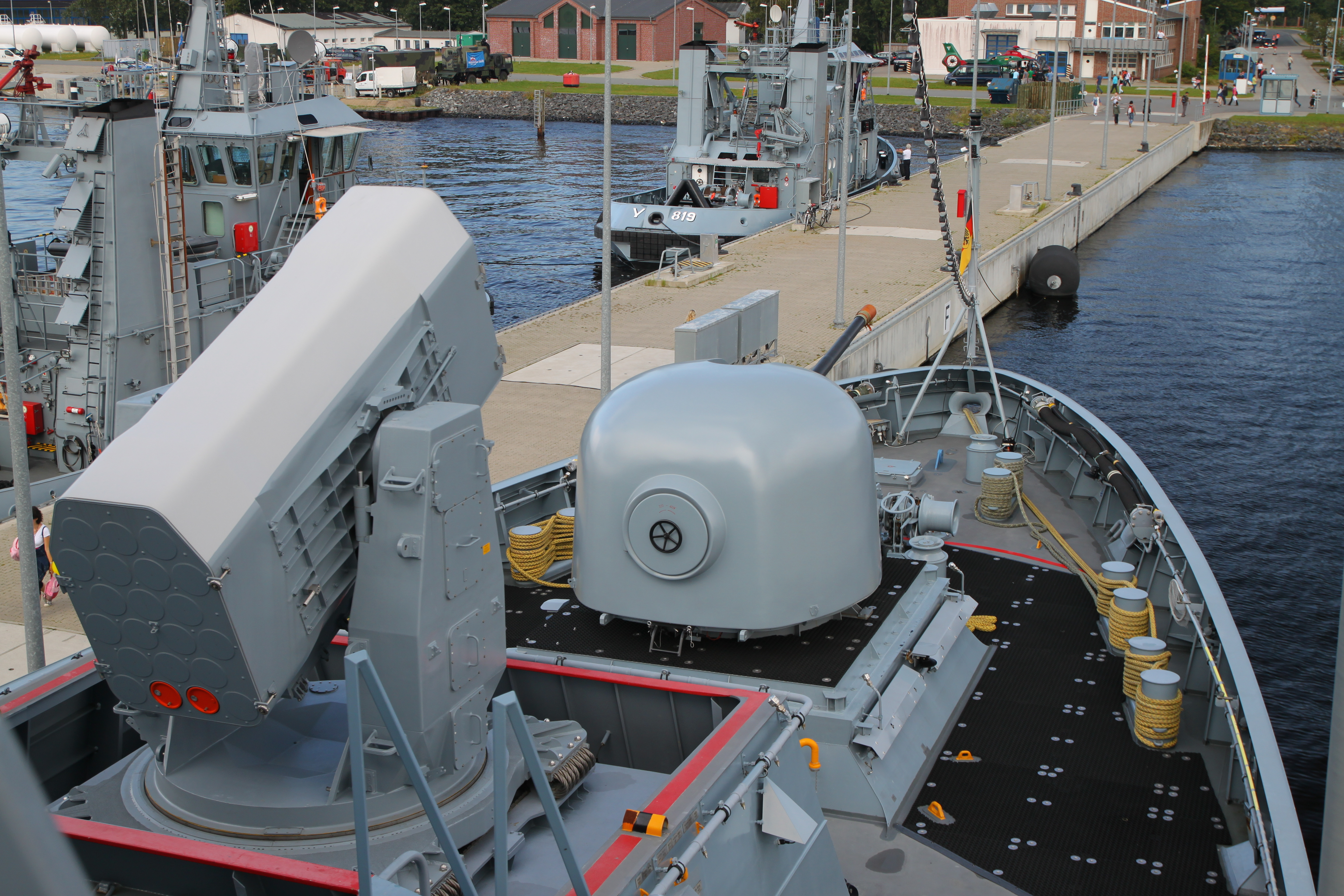 Korvette Magdeburg F261 Hanse Sail 2011